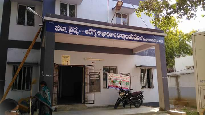 జిల్లా వైద్య మరియు ఆరోగ్యశాఖాధికారి కార్యాలయం, జోగులాంబ గద్వాల జిల్లా